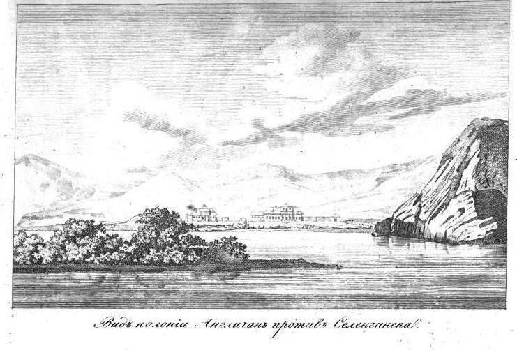 Здания Английской духовной миссии в Селенгинске.